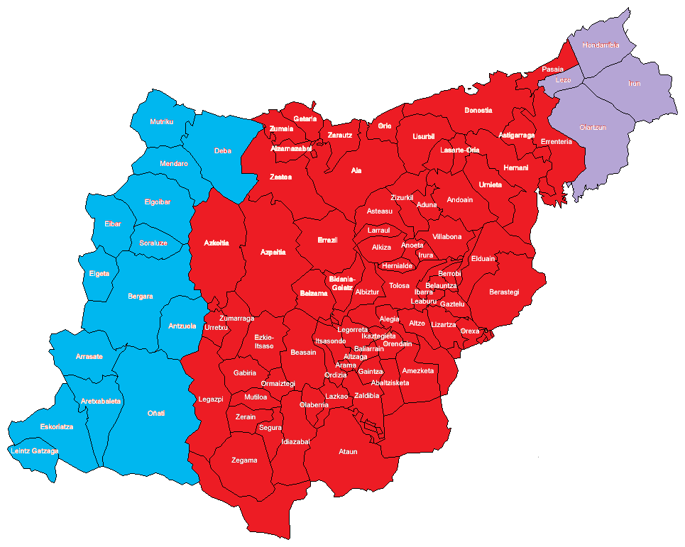 Euskararen euskalkiak Gipuzkoan. Bizkaiera (urdin), Gipuzkera (gorri) eta Iparraldeko Goi Nafarrera (more). - The Basque language's dialects in Gipuzkoa. Biscain dialect (blue), Guipuscoan dialect (red) and Northern Upper Navarrese dialect (purple).